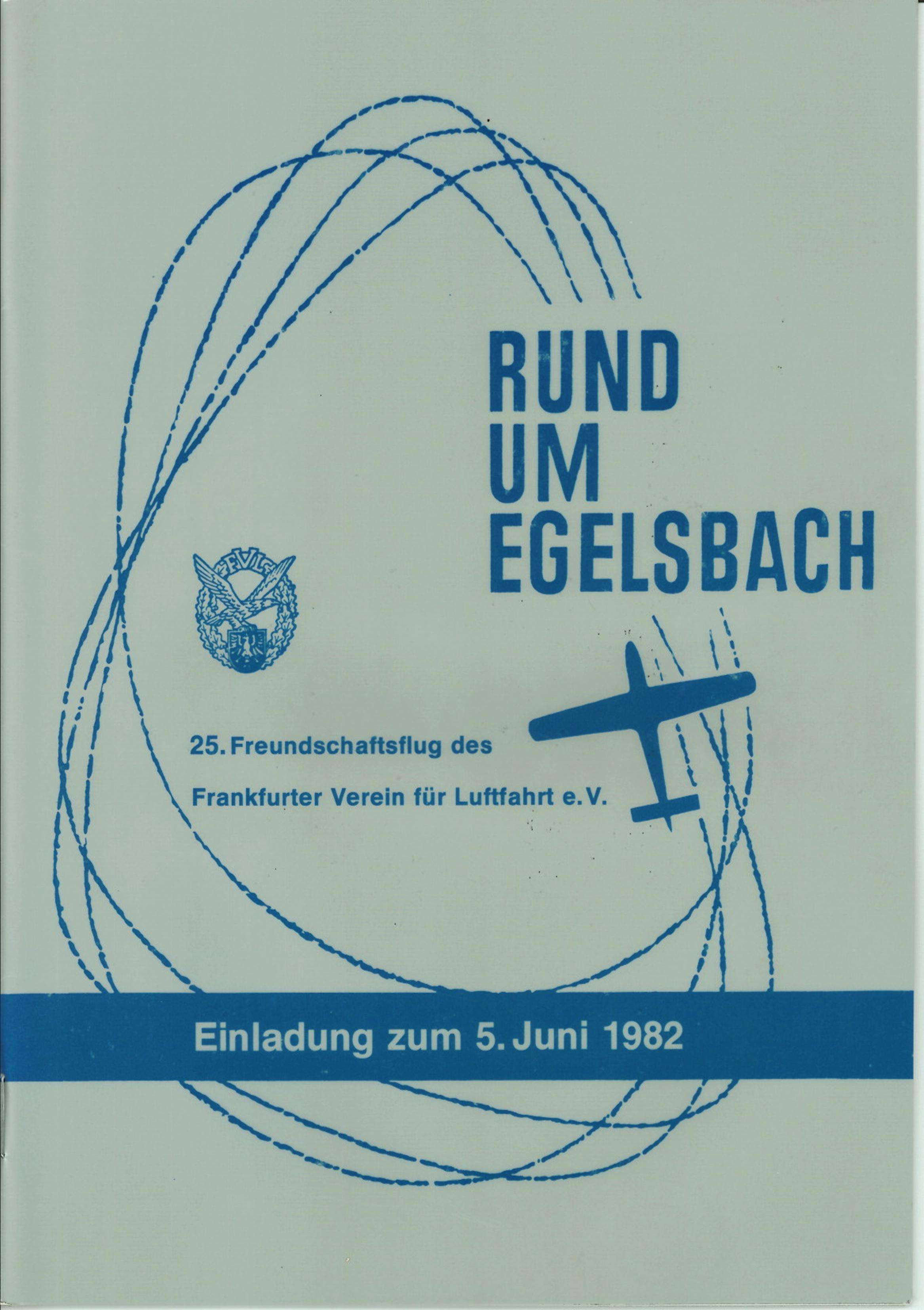 Ausschreibungheft Rund um Egelsbach